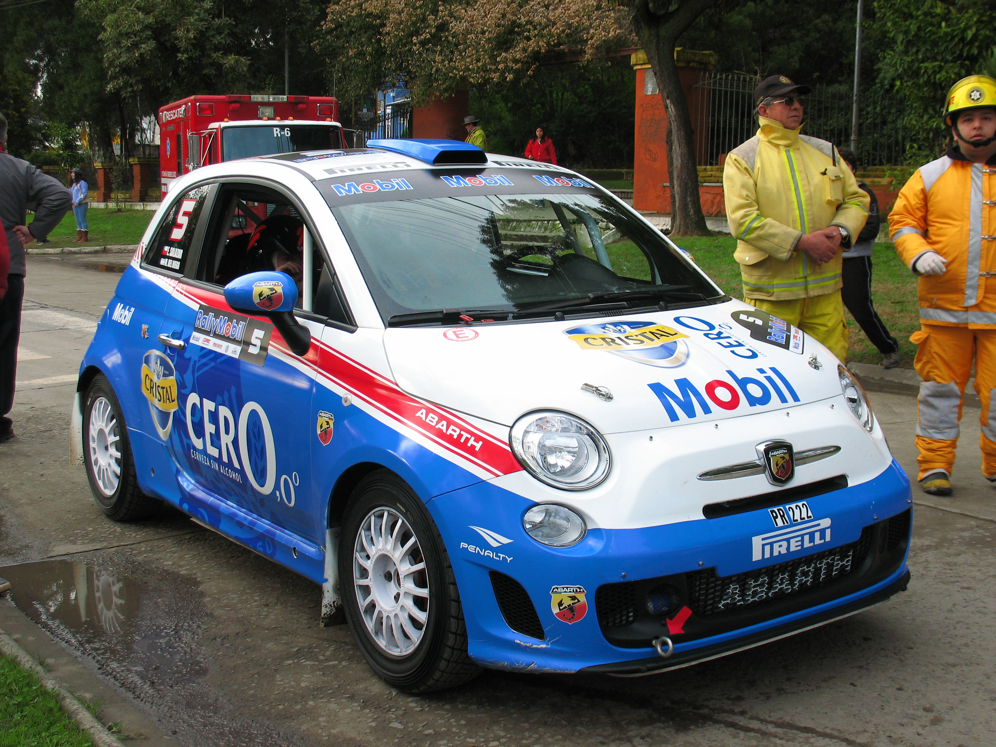 Rally Mobil en Curico. El que manejaba Eliseo en el rally mobil (ese que se la salió la rueda)